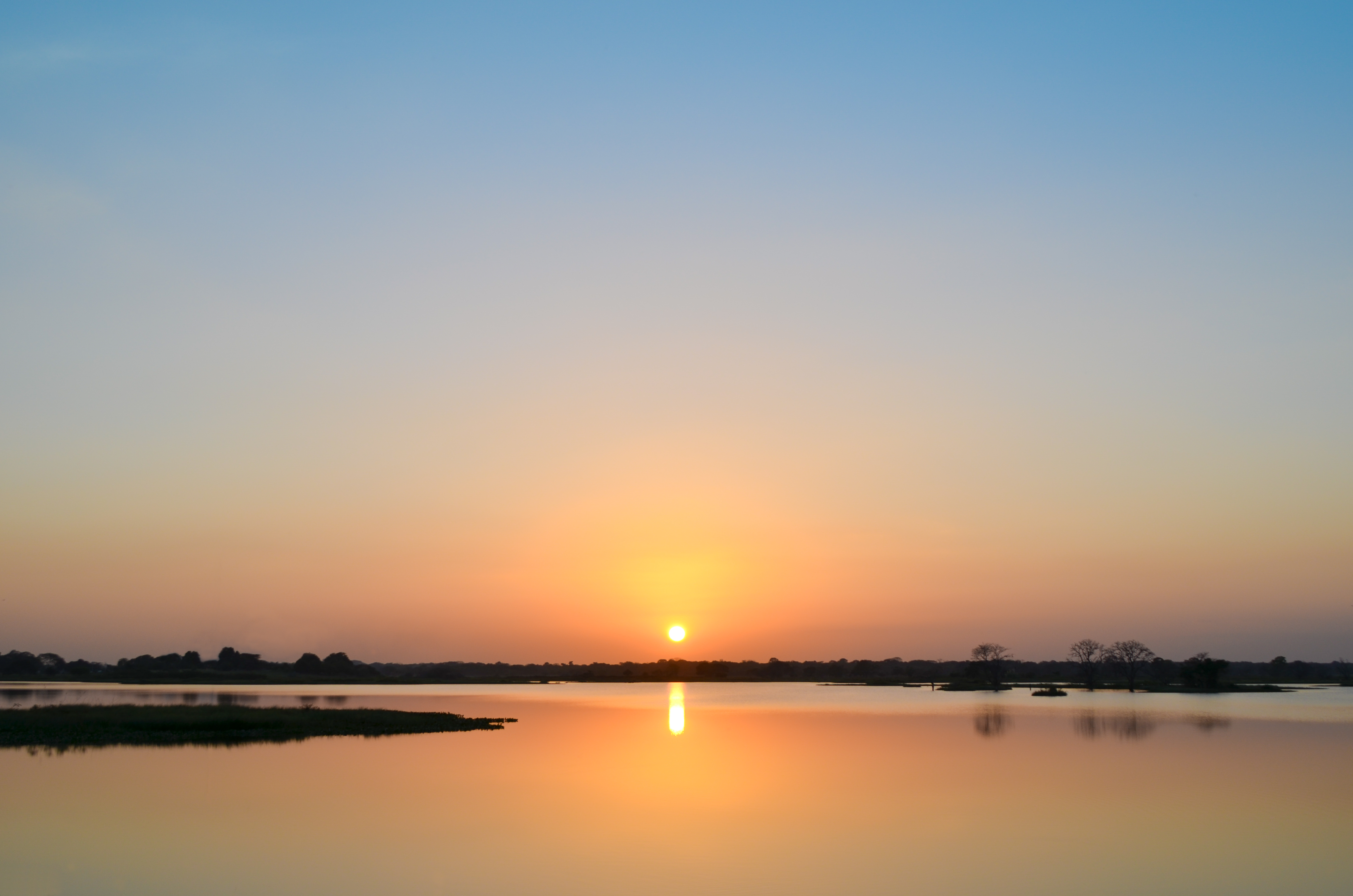 Fotografía capturada en Camaguán, Estado Guárico.